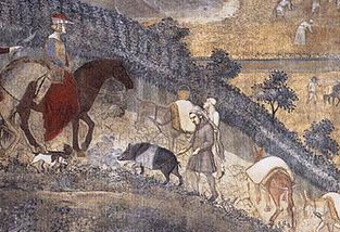 La prima traccia storica della Cinta Senese : Particolare dell'affresco (1340) di Ambrogio Lorenzetti nel Palazzo Civico di Siena – Italia.